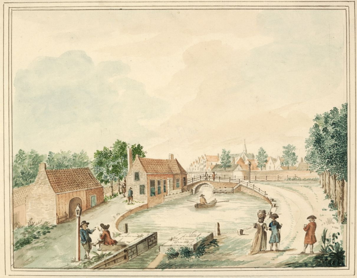 De naakte Sluis 1788. Gezicht op de Vliet met links de Jan van Goyenkade. Op de achtergrond de Naakte- of Neksluis en sluiskolk. Rechts de Schelpenkade en op de achtergrond de Pieterskerk. Tekening in kleur (1778) door Jacob Timmermans.